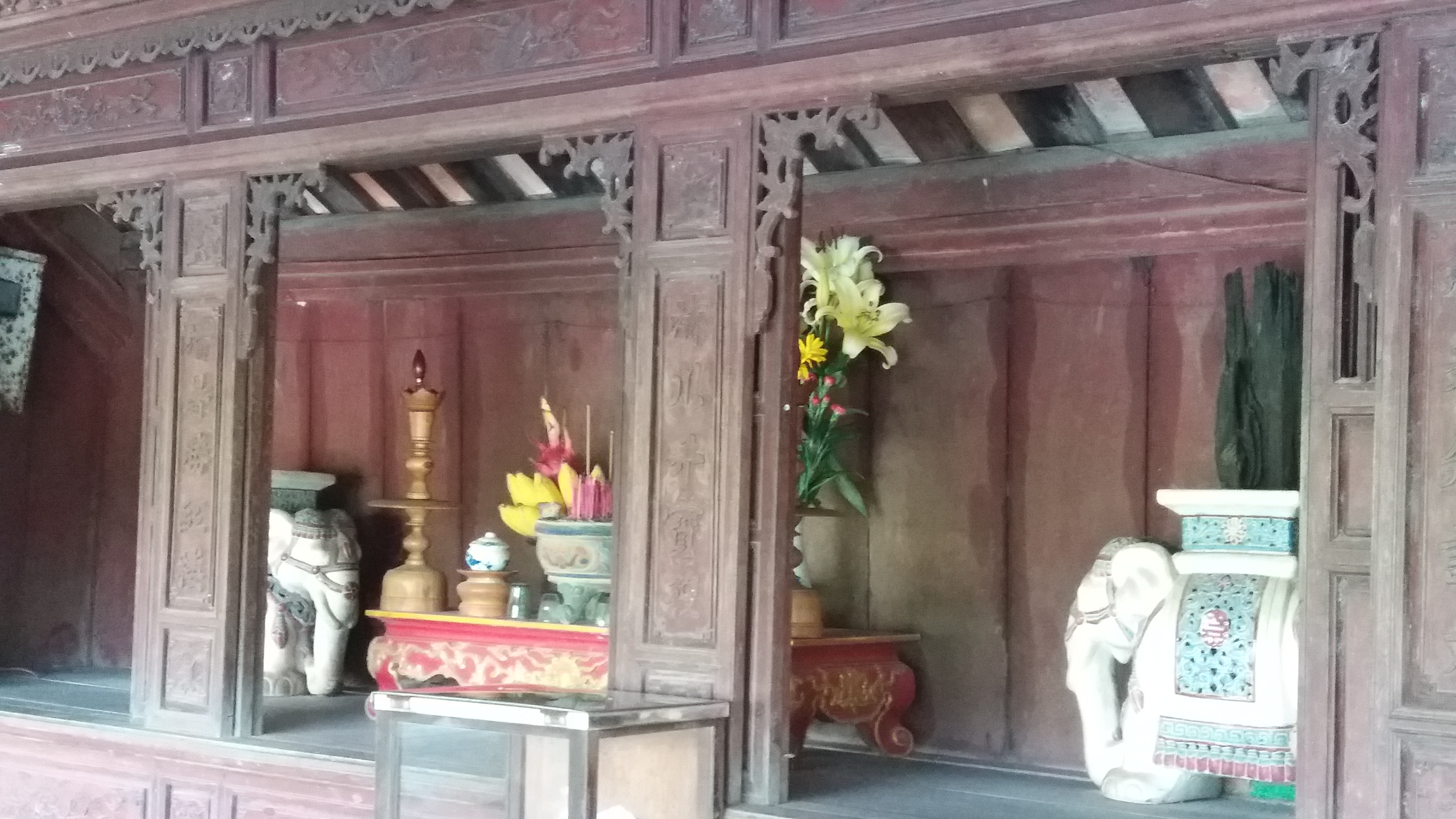 Hué. Pont Thanh Toàn (XVe siècle). L'autel au milieu du pont. Photo prise le 16 mars 2019.